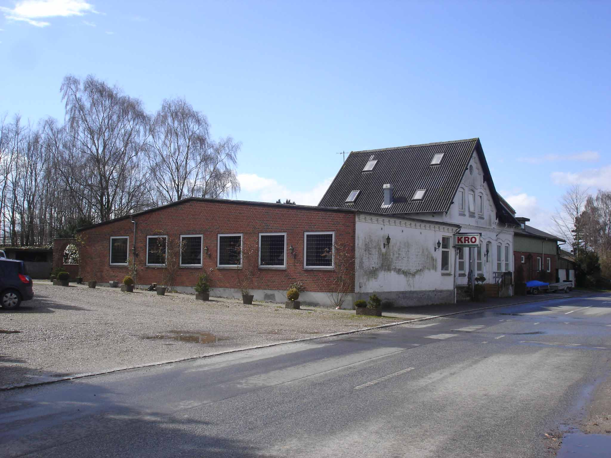 Kirkehørup Station, vejsiden fra NØ